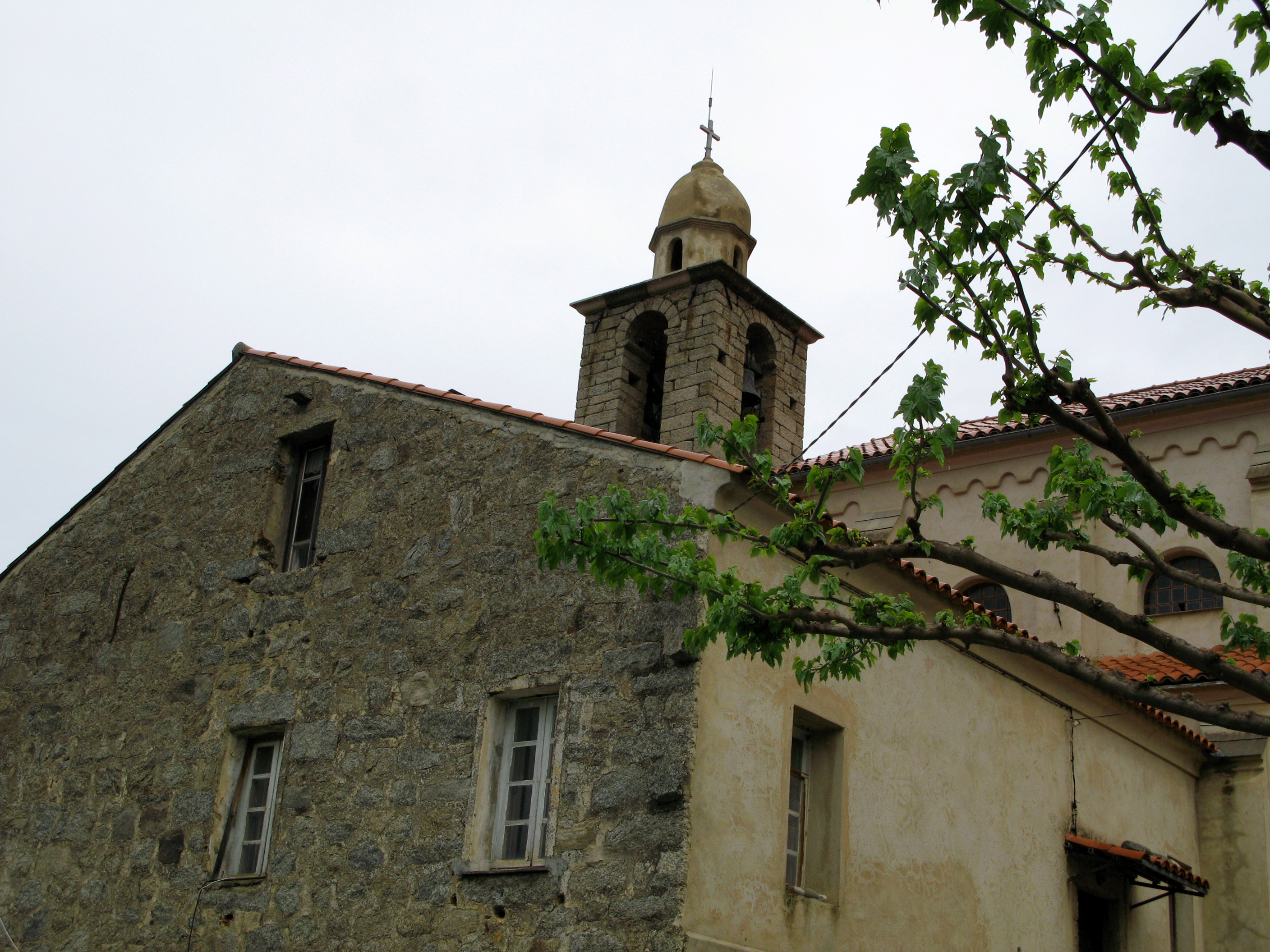 Viggianello (Corse-du-Sud, France) - Le clocher et son dôme (vue depuis la Route Départementale D19).